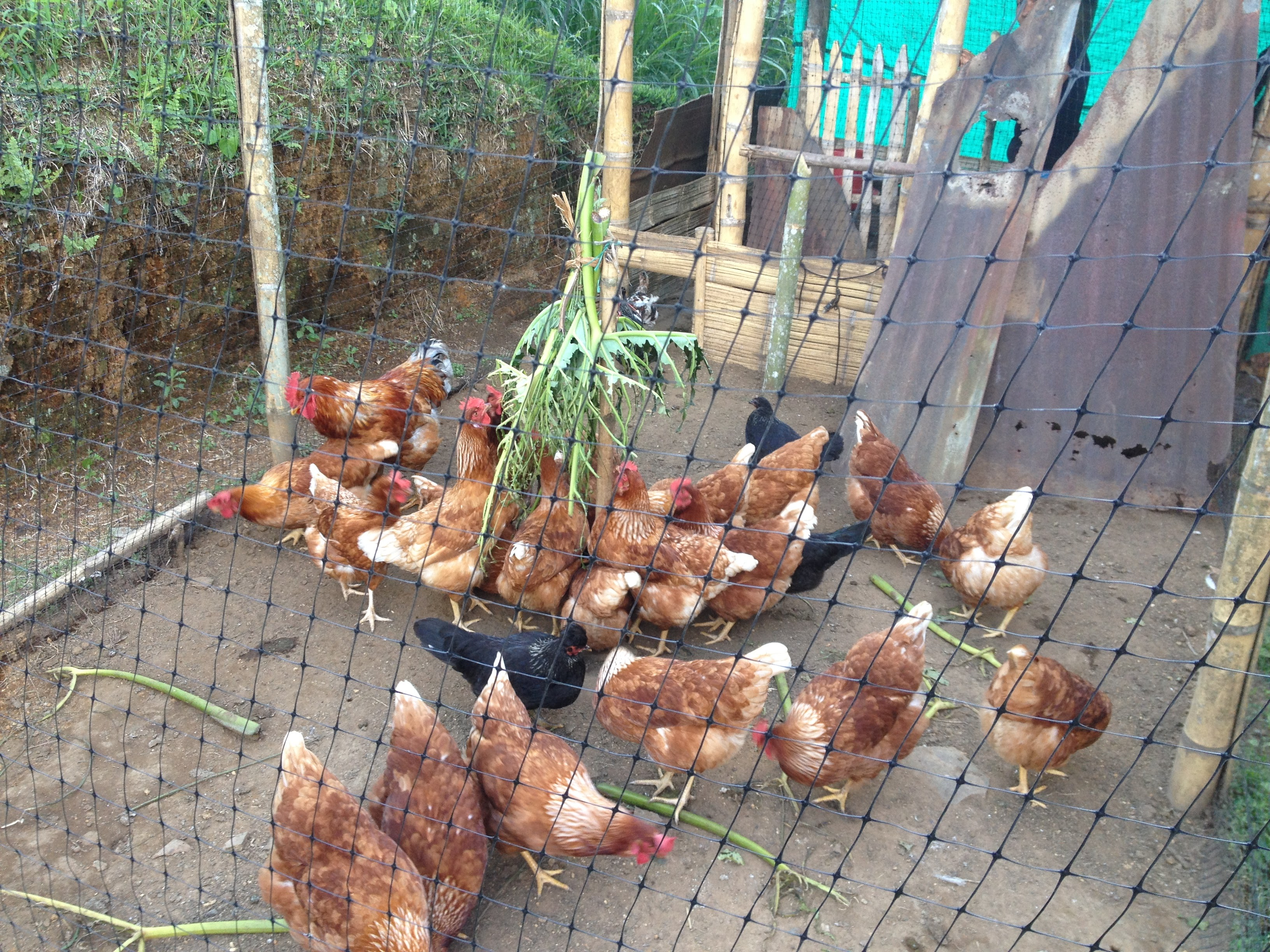 Vereda La Cimarrona de Cajibío Esta fotografía fue tomada en el municipio colombiano con código 19130.